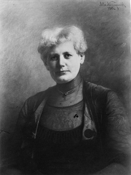 Norwegian doctor Marie Spångberg (1865-1942)